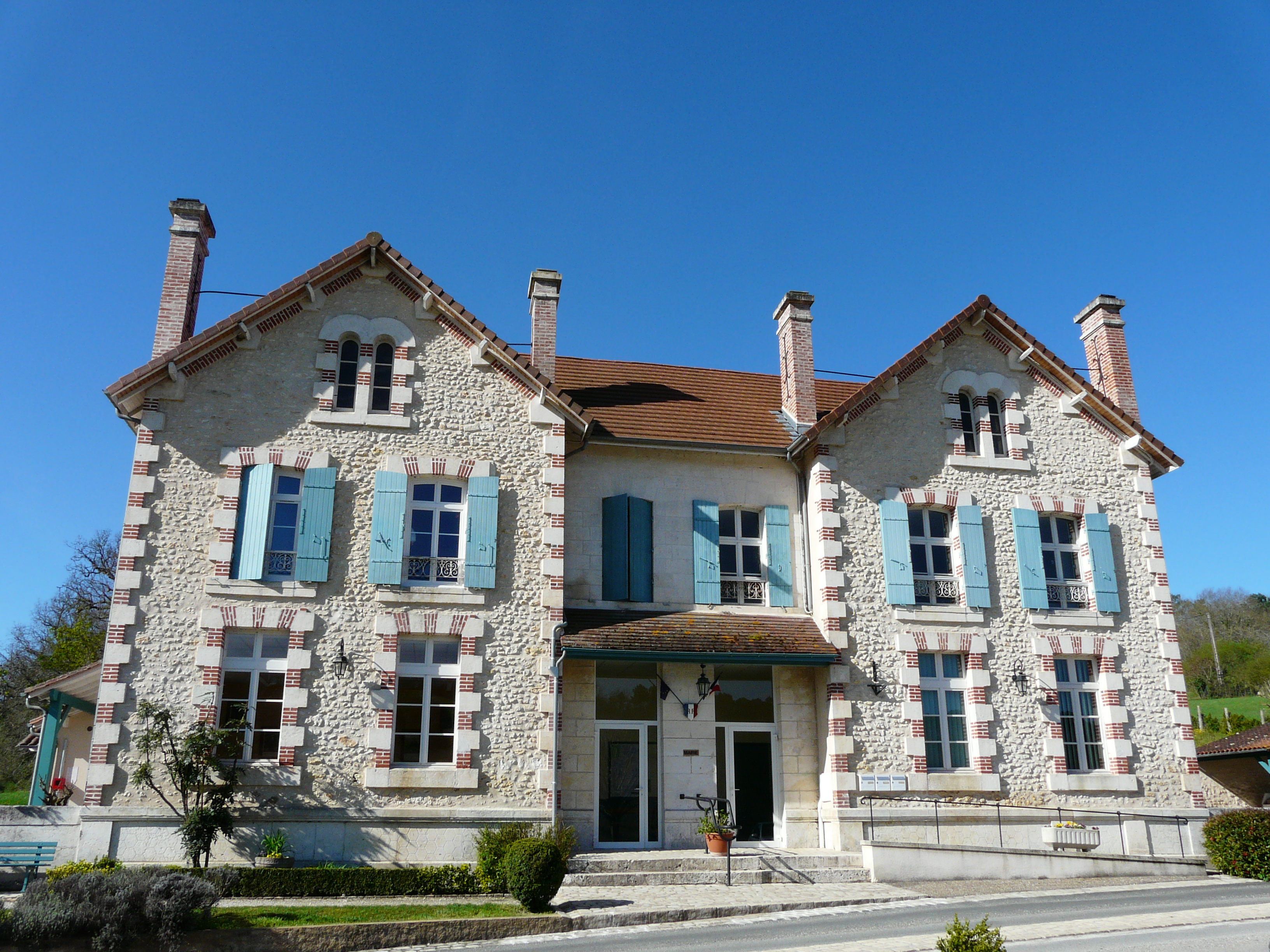 La mairie de Vallereuil, Dordogne, France.